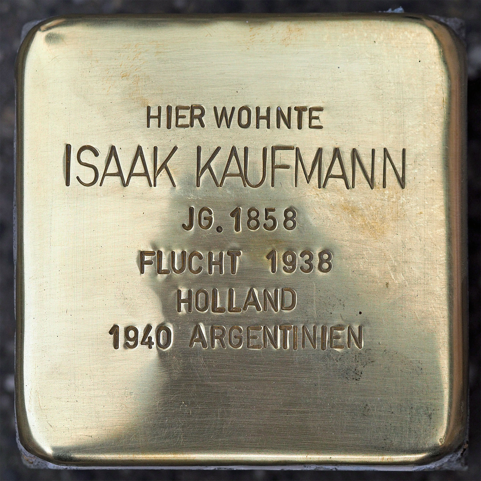 Stolpersteine in Tönisvorst: Isaak Kaufmann